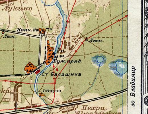 Карта Балашихи, 1931 год.